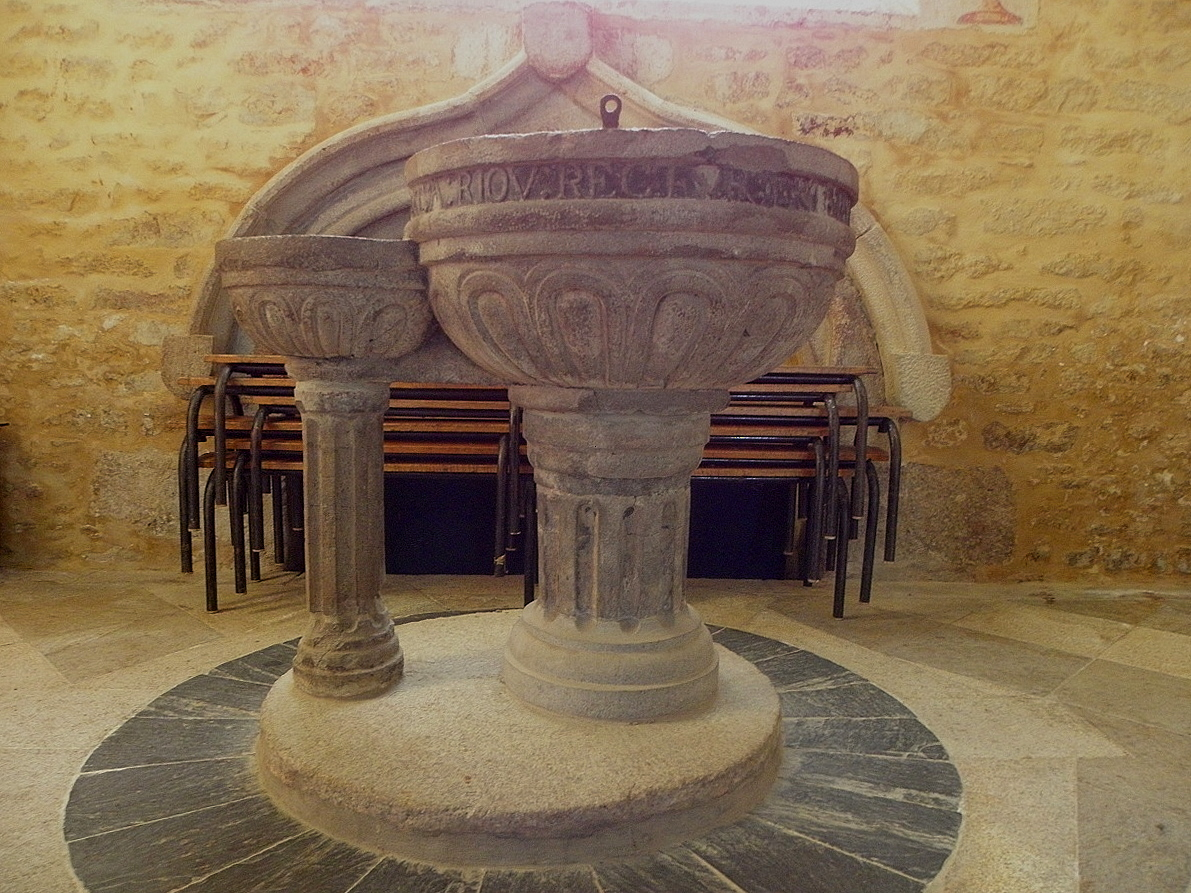 Église Saint-Édern de Plouédern (29). Fonts baptismaux.